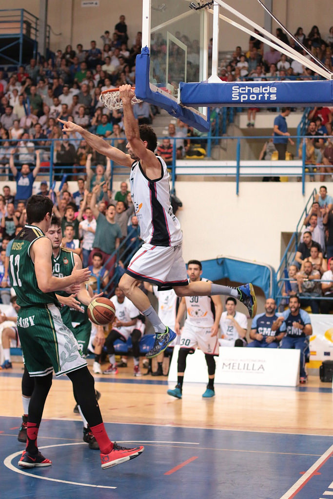 Mate de Héctor Manzano. Temporada 15-16